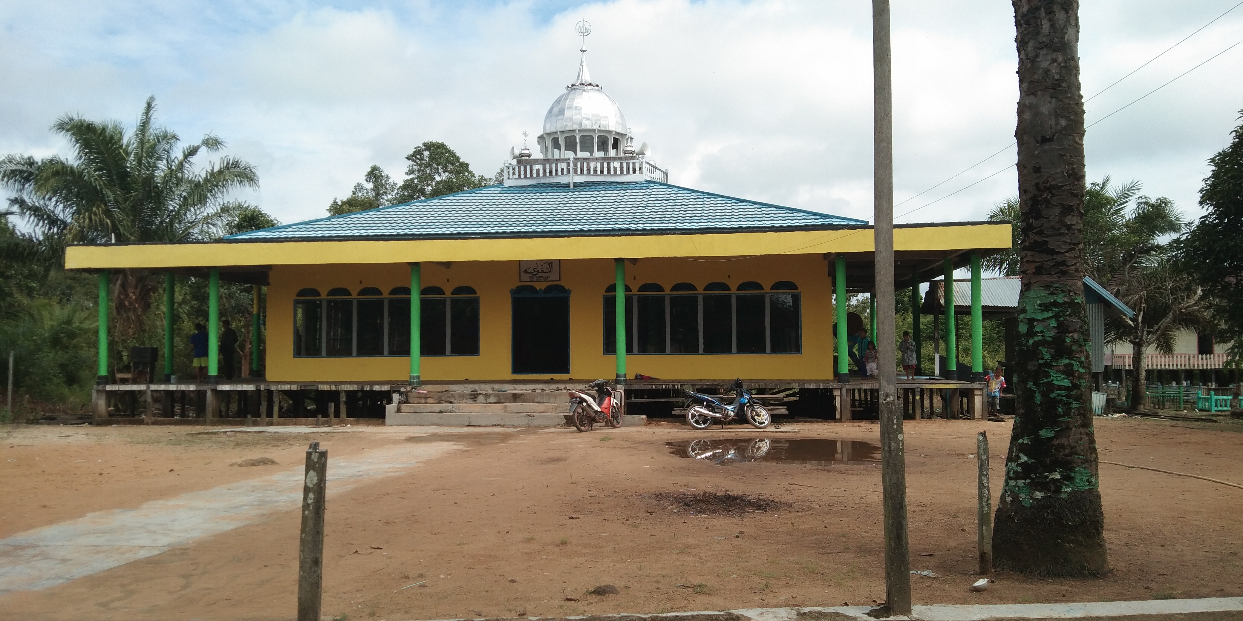 Gambar ini diambil pada tahun 2017 lalu